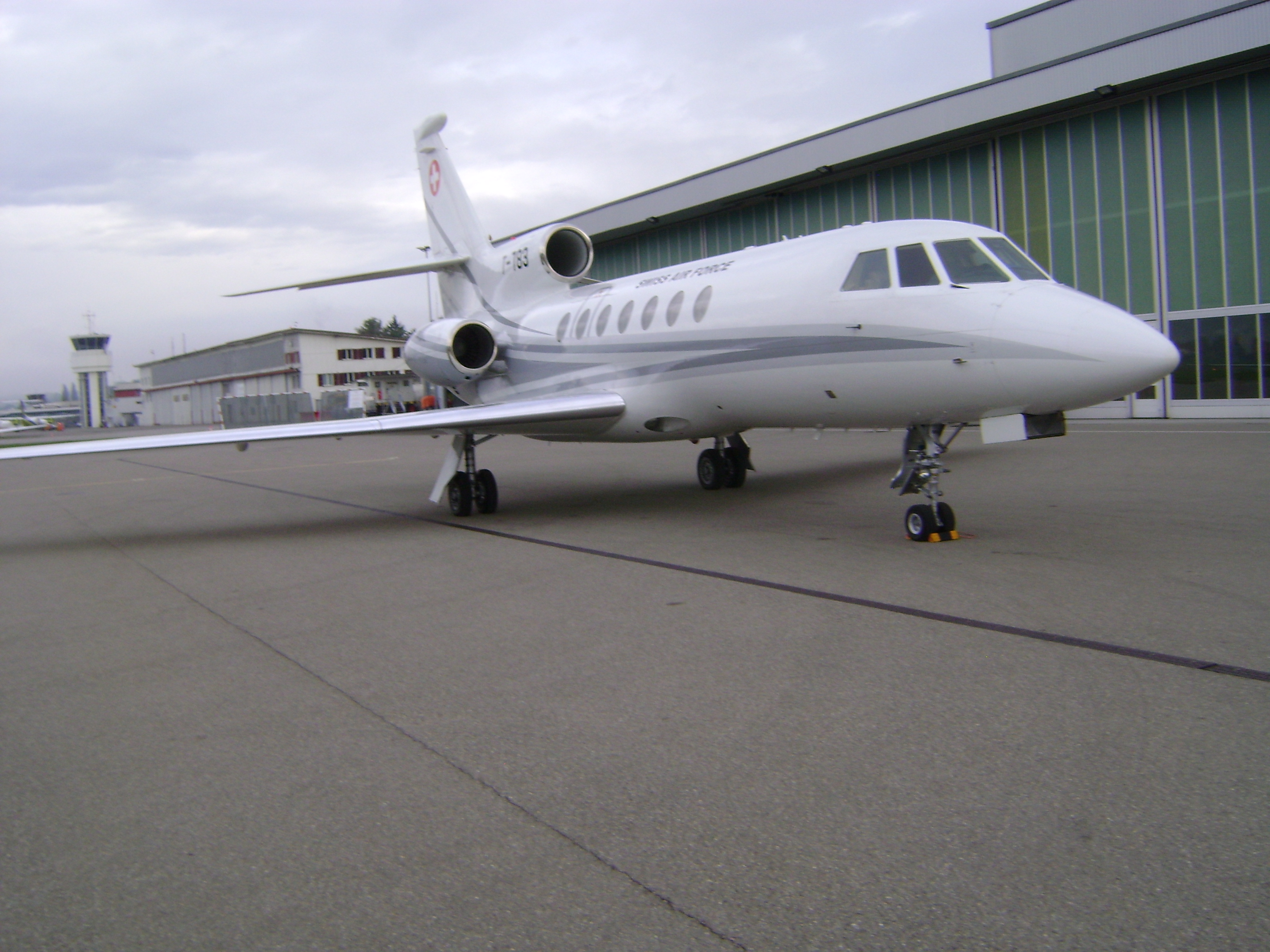 Swiss Air Force Falcon50